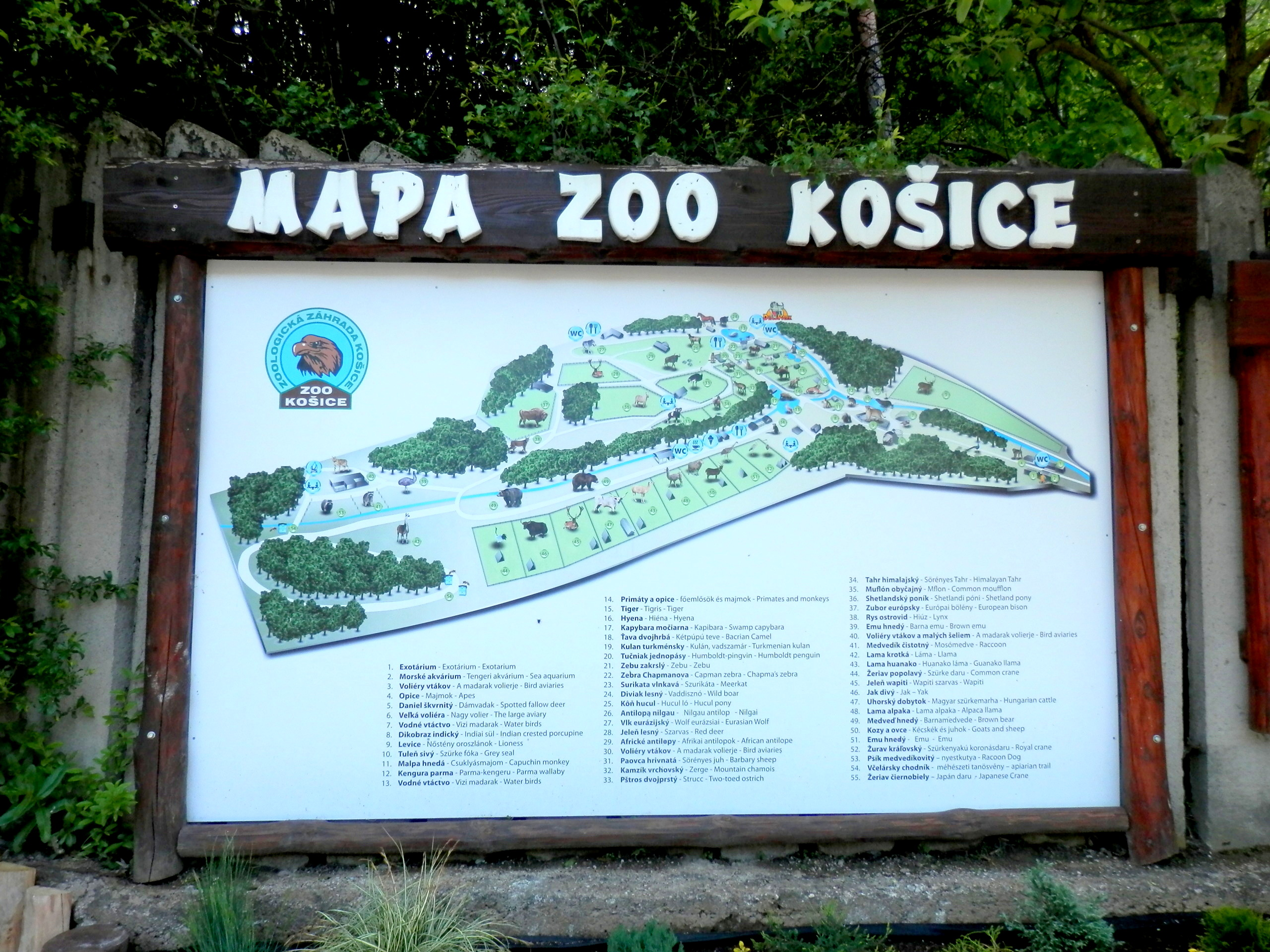 Zoologická záhrada, Košice - Kavečany.